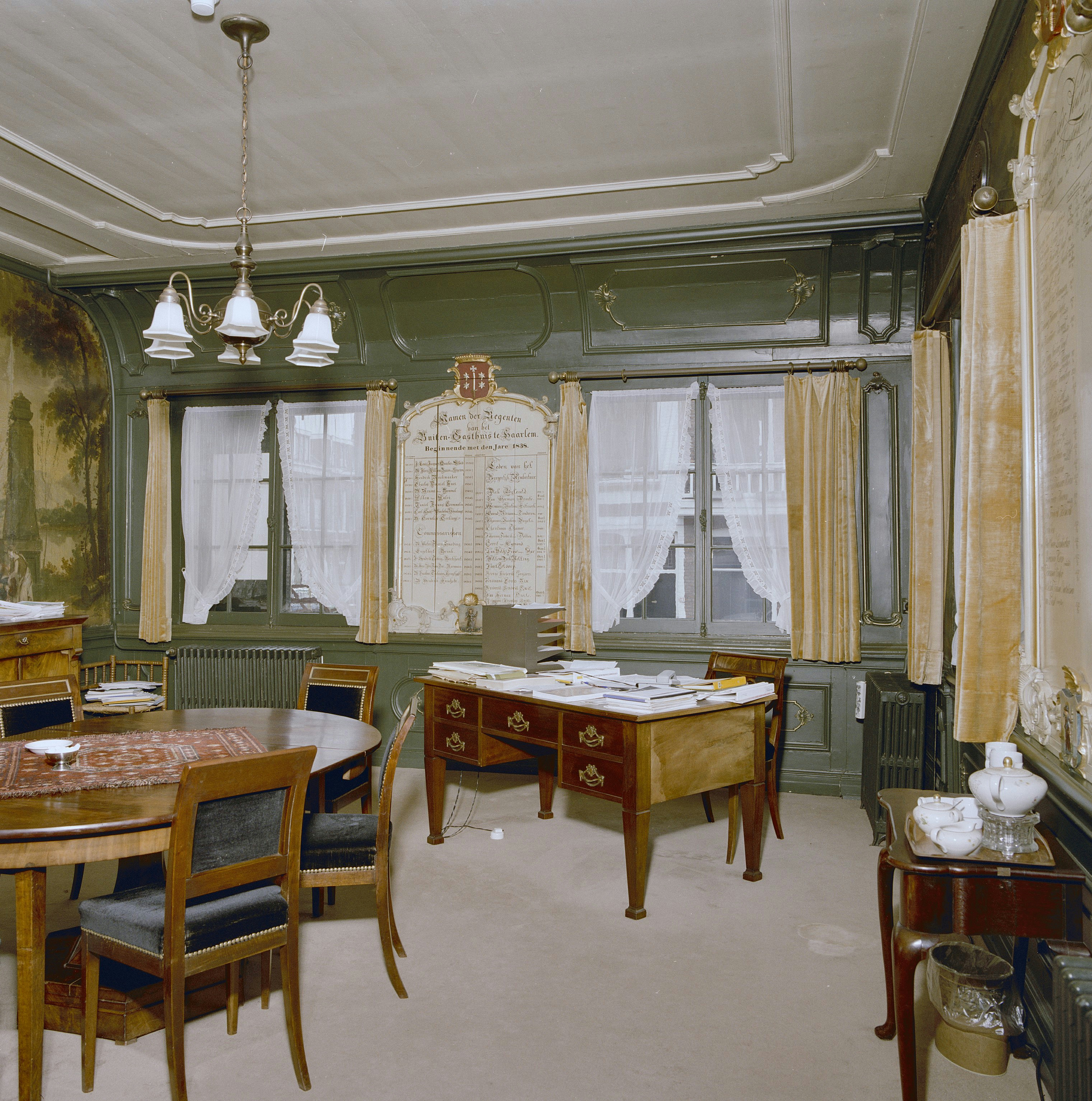 Het Dolhuys: INTERIEUR, OVERZICHT, REGENTENKAMER, WANDBESPANNING